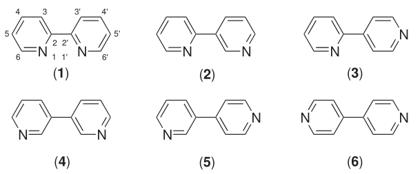 바이피리딘의 6가지 이성질체이다.